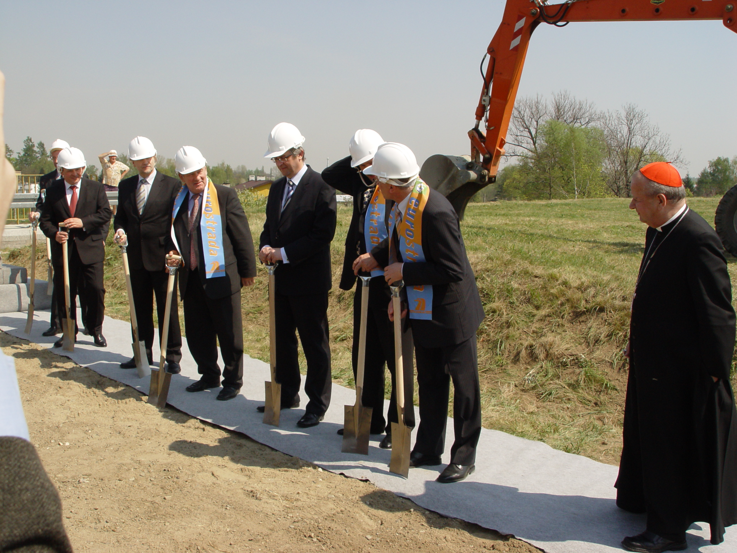 Rozpoczęcie budowy autostrady A4 (docinek: Kraków - Szarów)